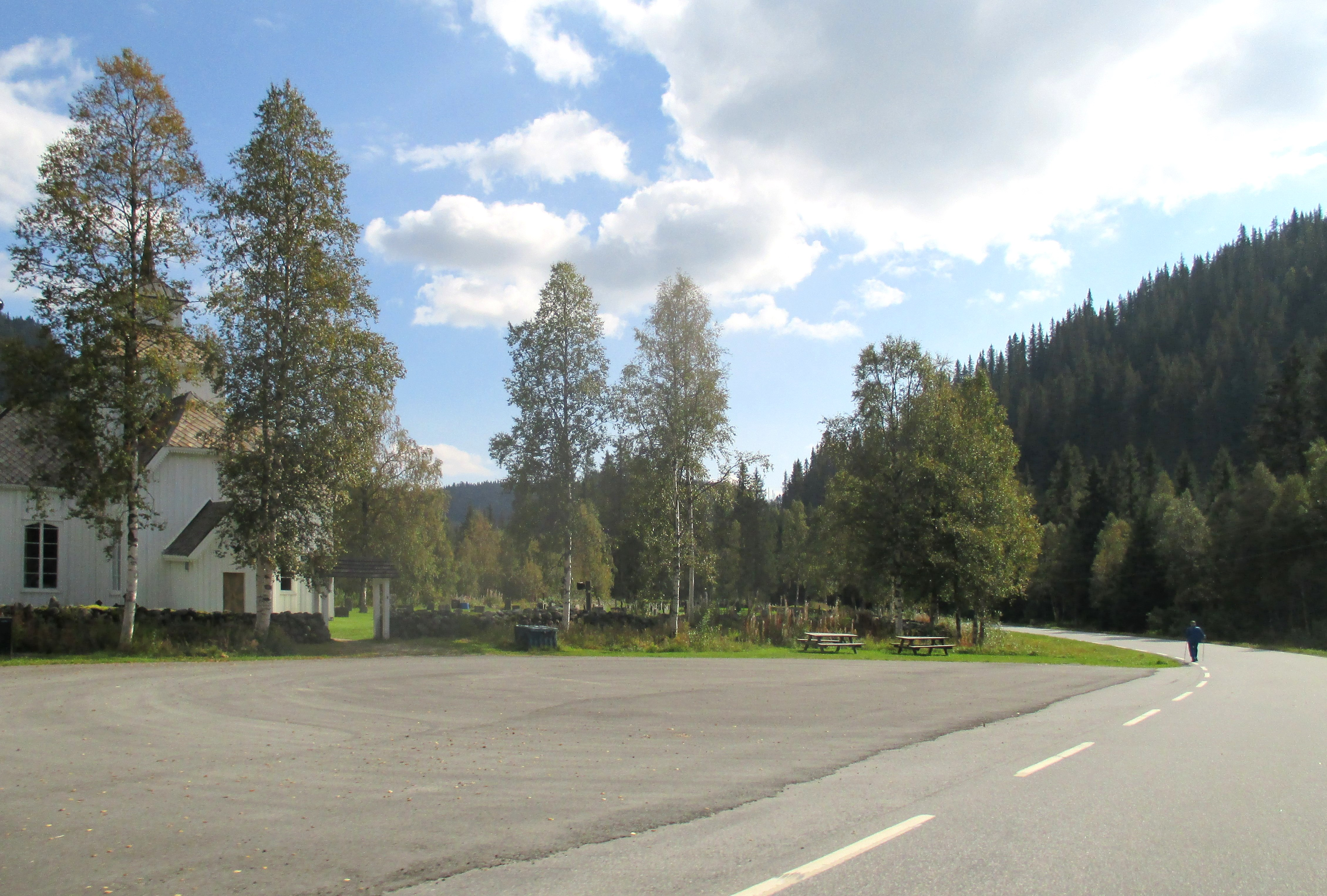 Fylkesvei 503 ved Åmotsdal kirke